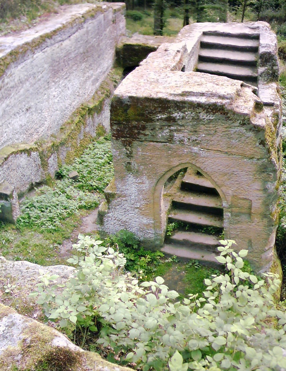 Der Torfelsen